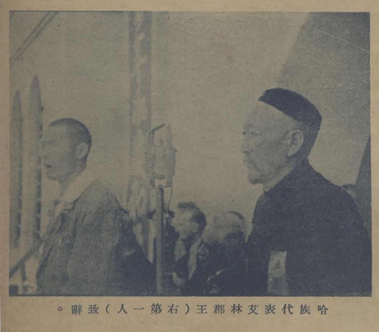 中文（中国大陆）: 迪化各界慶祝和平大會盛況